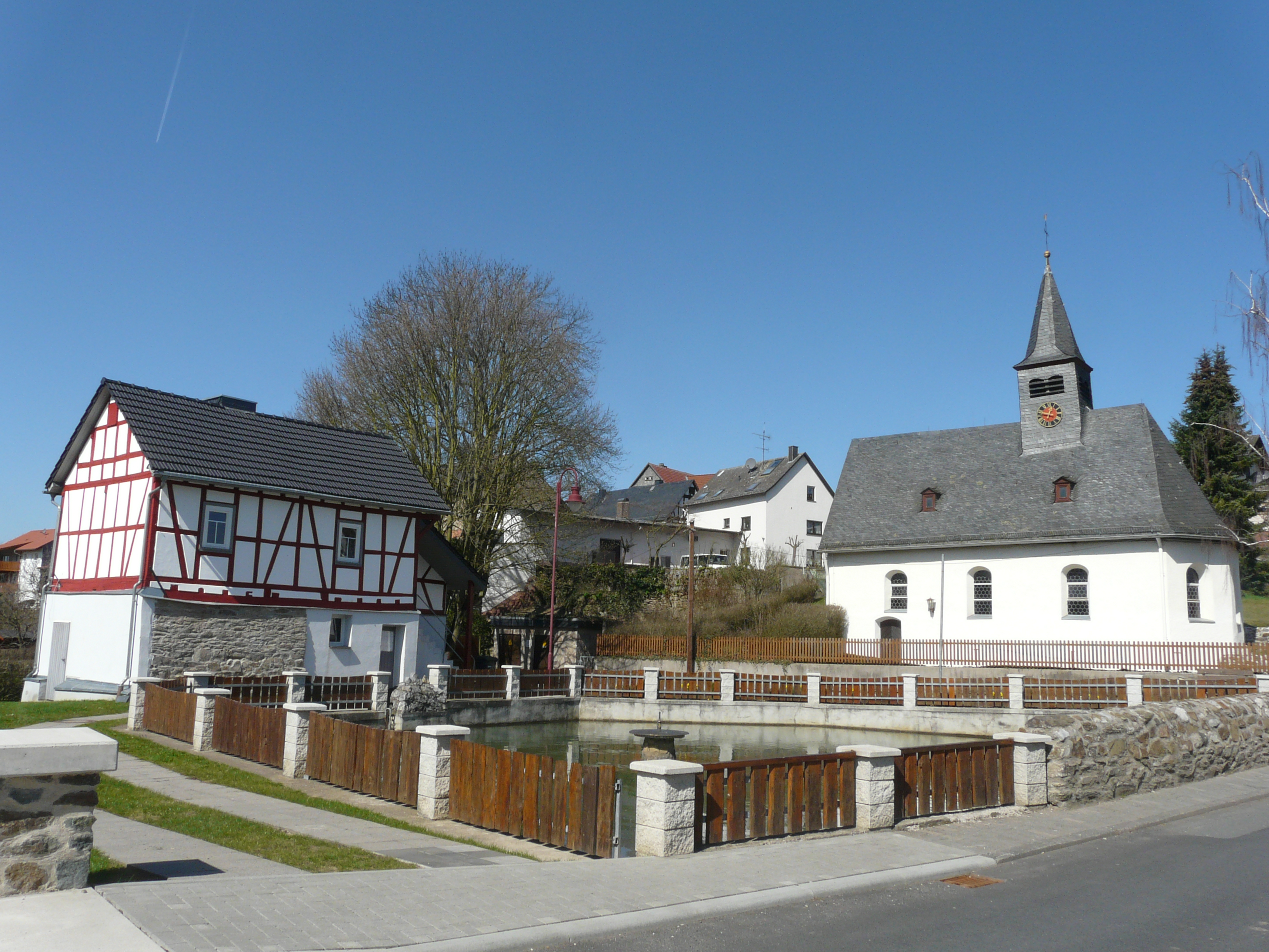 Brandweiher mit Backhaus (links) und Dorfkirche (rechts) in Schöffengrund-Oberquembach (Lahn-Dill-Kreis, Hessen)